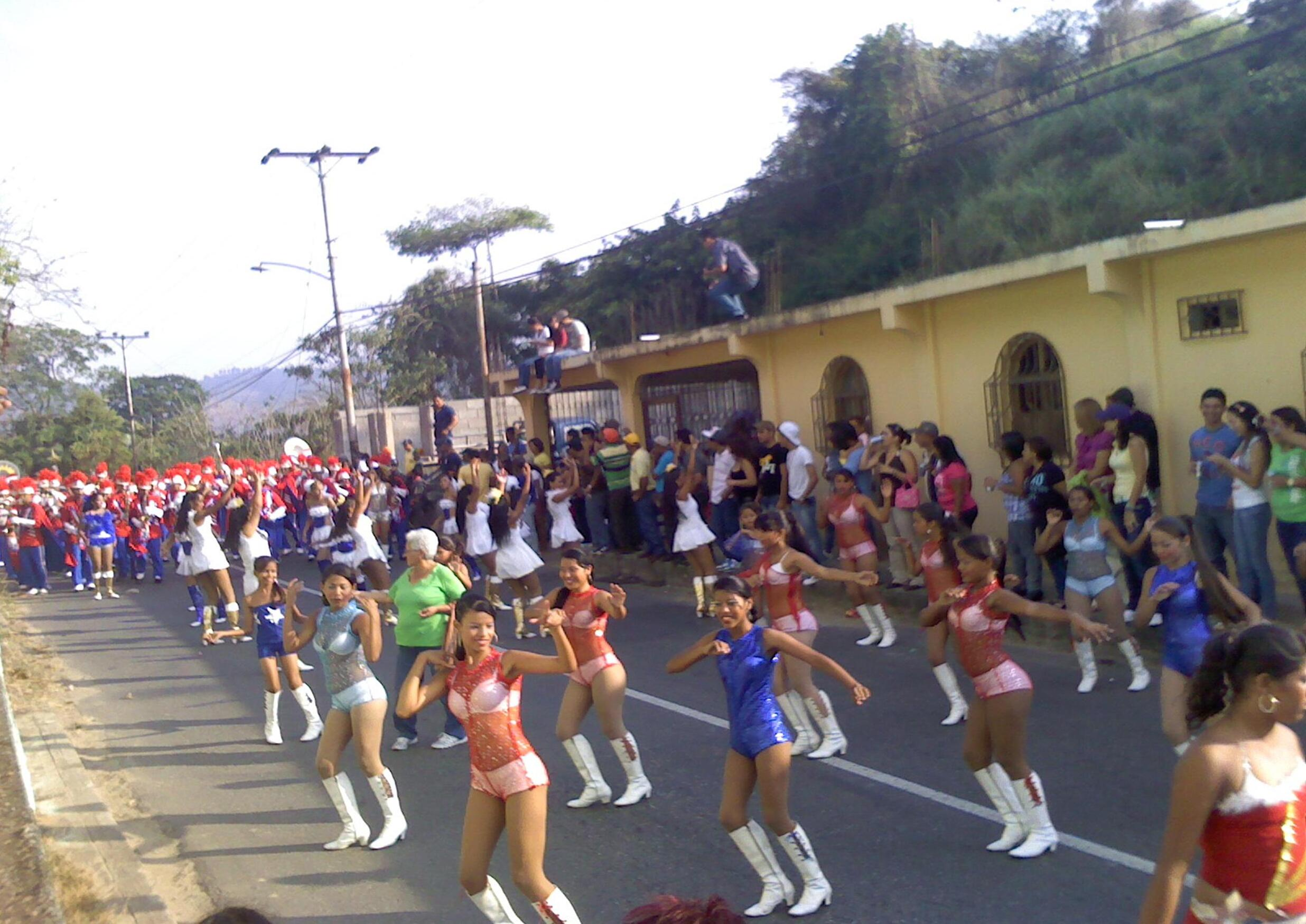 banda show fundesoy en el desfile de carnaval 2011